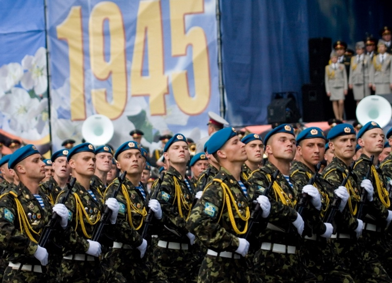 Парад перемоги, Київ.